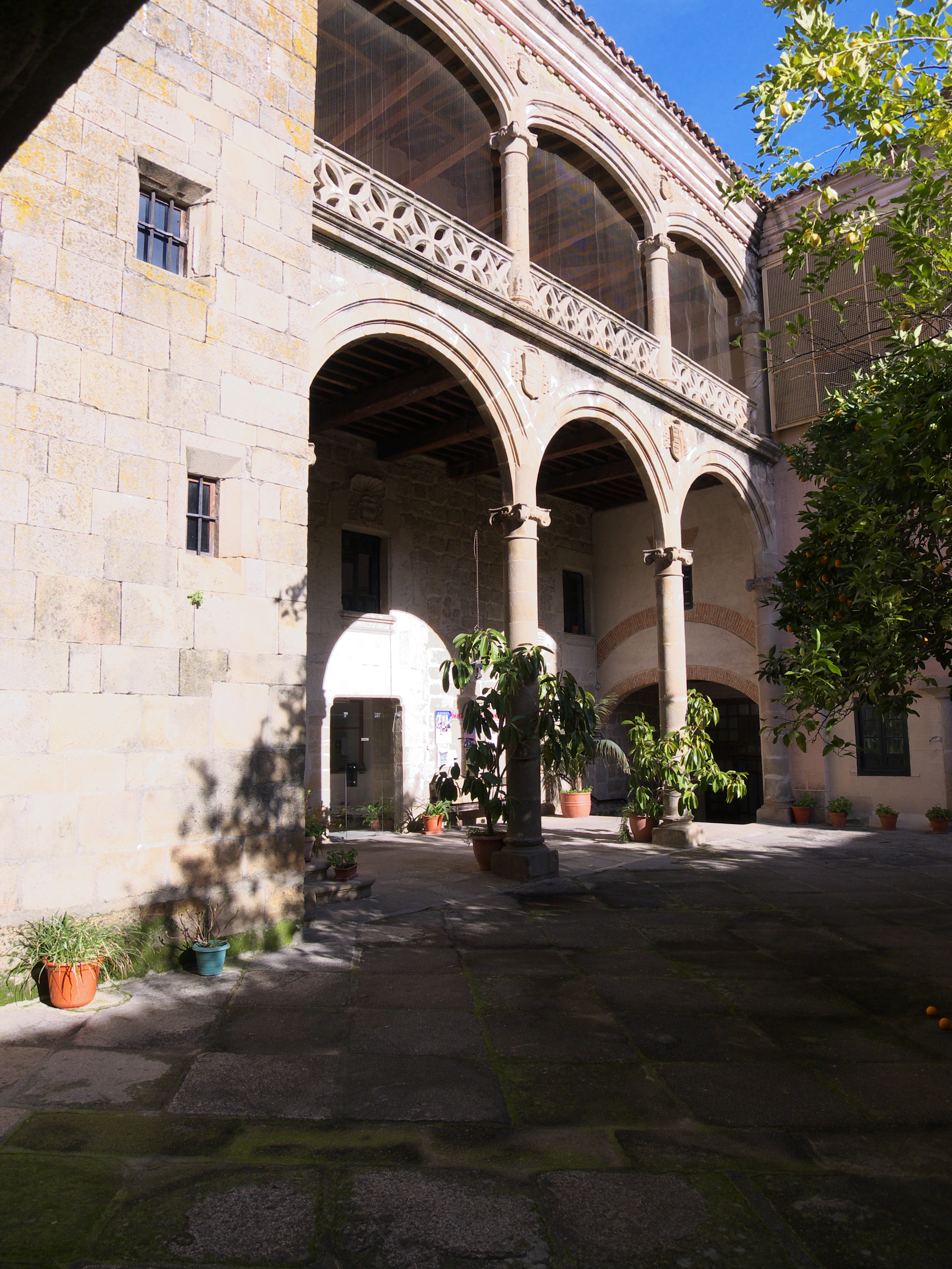 Un obispo y arquitecto.